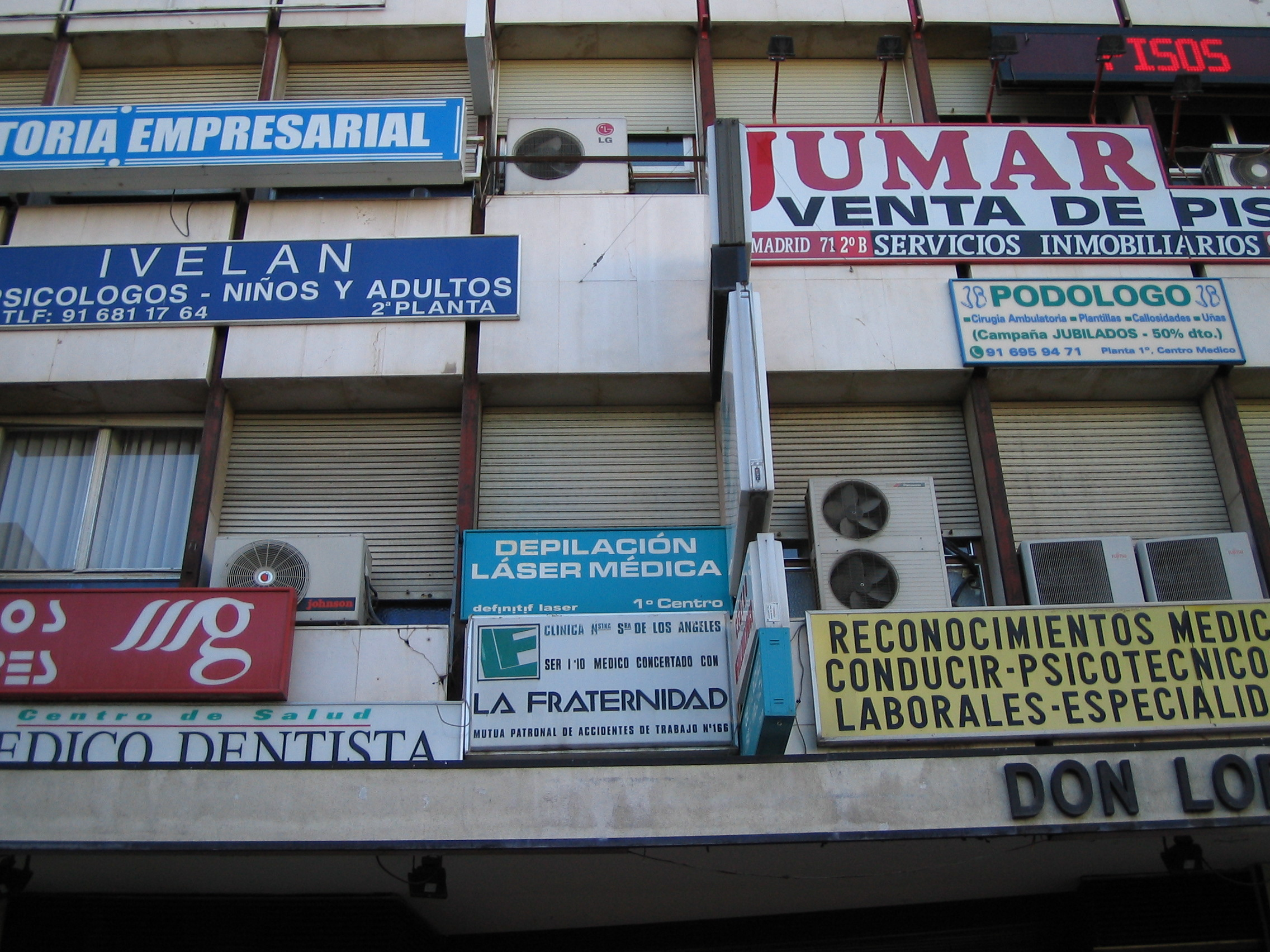 Edificio lleno de rotulos comerciales en el centro de Getafe